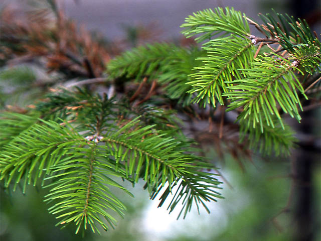 Abies sachalinensis en Shiretoko de Hokkaido, Japon トドマツ、北海道・知床にて撮影